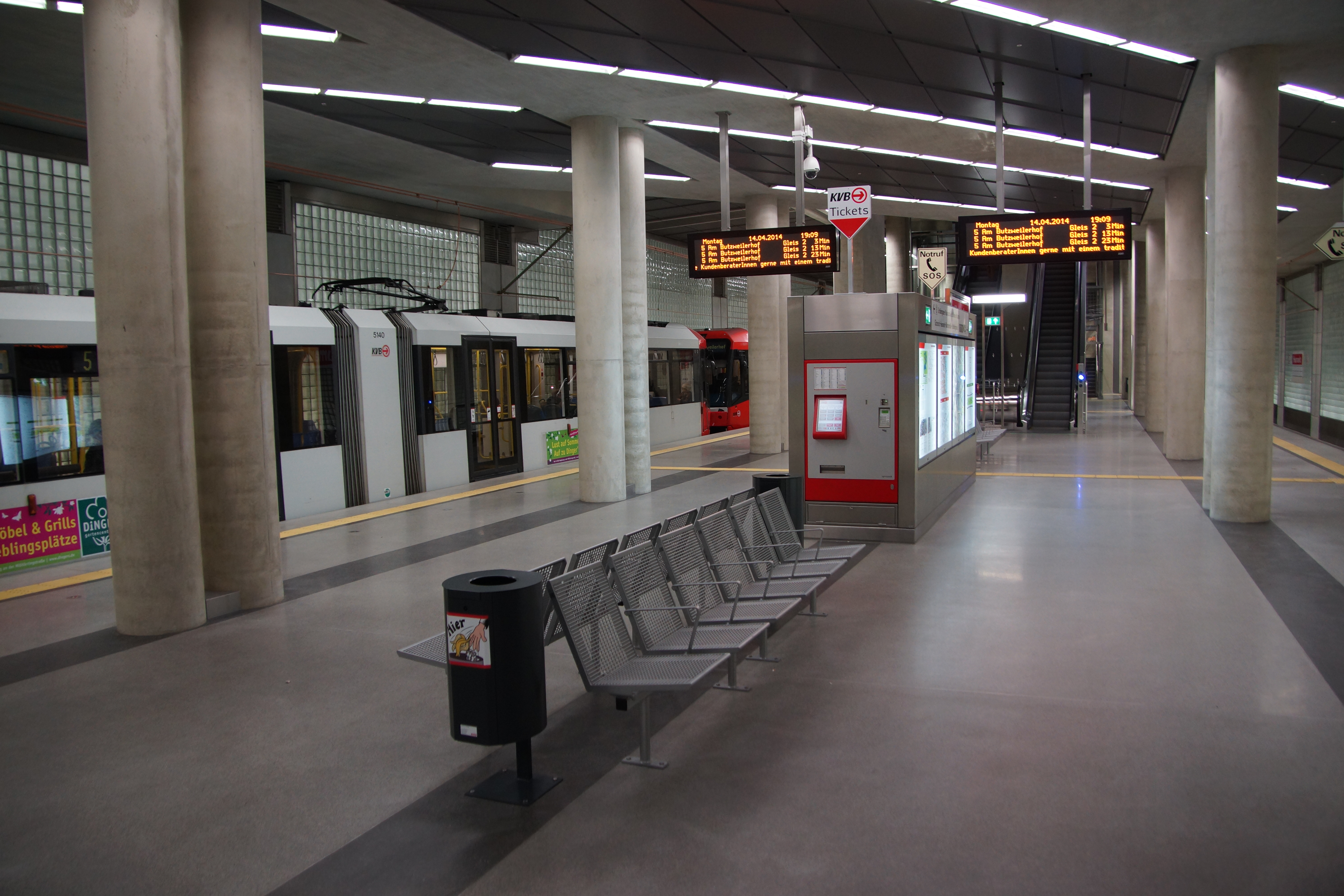 unterirdische Stadtbahnhaltestelle Heumarkt der Nord-Süd-Stadtbahn, untere Ebene, Nord-Süd-Bahn, Linie 5